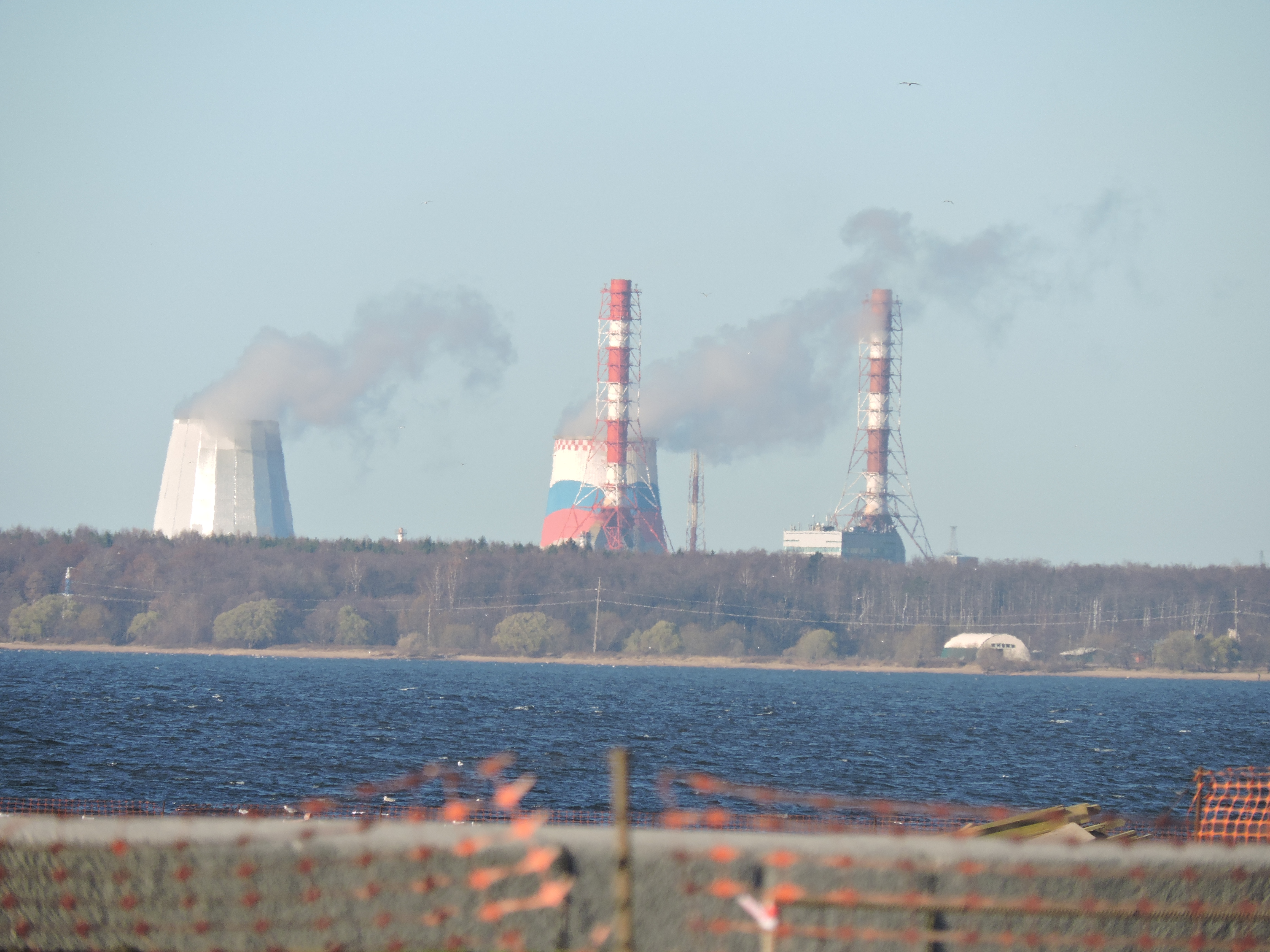 Северо-Западная ТЭЦ - первая российская ТЭЦ с парогазовым циклом